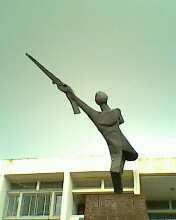 সংশপ্তক ভাস্কর্য, জাহাঙ্গীরনগর বিশ্ববিদ্যালয়।